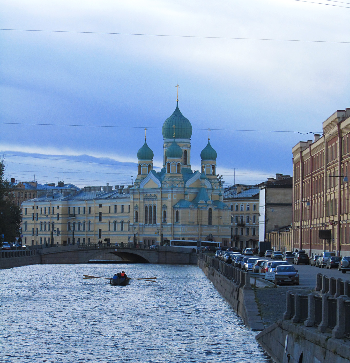 Свя́то-Иси́доровская це́рковь — приходской православный храм в Санкт-Петербурге, находящийся на пересечении Лермонтовского проспекта и проспекта Римского-Корсакова у Могилёвского моста. Построена в 1903—1907 годах по проекту архитектора A. A. Полещука. Её верхний трёхпридельный храм освящён во имя священномученика Исидора Юрьевского, что и дало название всей церкви. Боковые приделы верхнего храма освящены во имя преподобного Серафима Саровского и святых апостолов Петра и Павла. Нижний храм Свято-Исидоровской церкви освящён во имя святого Николая Чудотворца. В 1901 году архитектор составил эскиз, а 23 августа 1902 года был утверждён окончательный проект трёхпридельной бесстолпной церкви на 720 человек. Сбор средств на строительство церкви осуществлялся по всей России, а первое пожертвование сделал Иоанн Кронштадтский. В проект также входил примыкающий дом для школы с общежитием, залом для бесед, книжным складом и библиотекой. Сначала был построен церковный дом и деревянная часовня, освящённая 30 марта 1903 года, а 24 августа 1903 года состоялась закладка каменного пятиглавого храма. На втором этаже церковного дома, в двусветном зале для бесед организовали временную церковь. Иконостас и образа для неё исполнило Общество взаимопомощи русских художников. 21 декабря 1903 года епископ Гдовский Константин, при участии Иоанна Кронштадтского освятил алтарь временной церкви во имя Исидора Юрьевского. А чуть позже, 7 февраля 1904 года был освящен её Серафимовский придел.